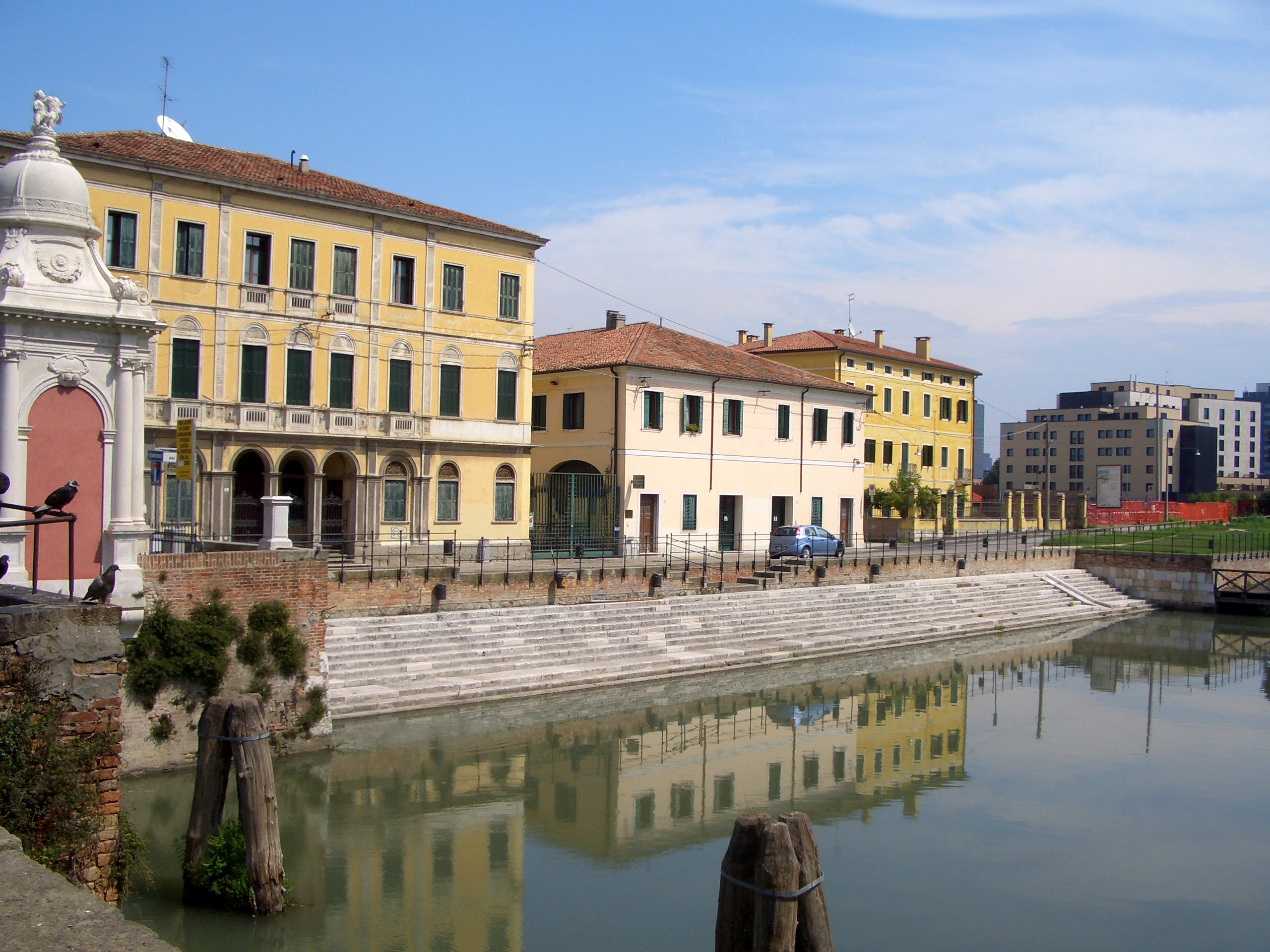 Approdo del Burchiello a Padova antistante alla Porta Portello. Foto scattata da me a Padova il 23.8.08.